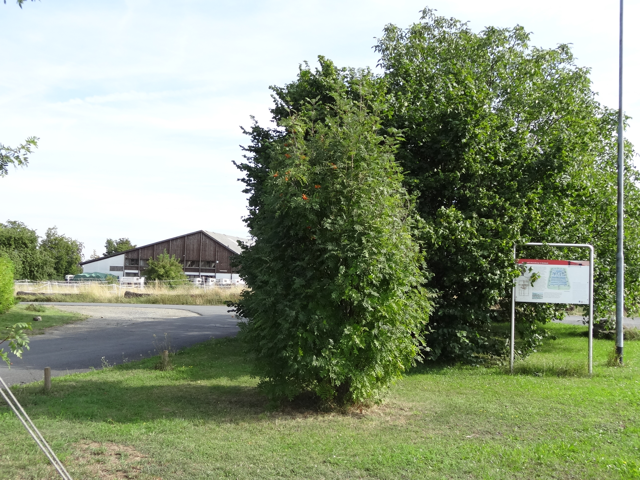 Kastell Butzbach